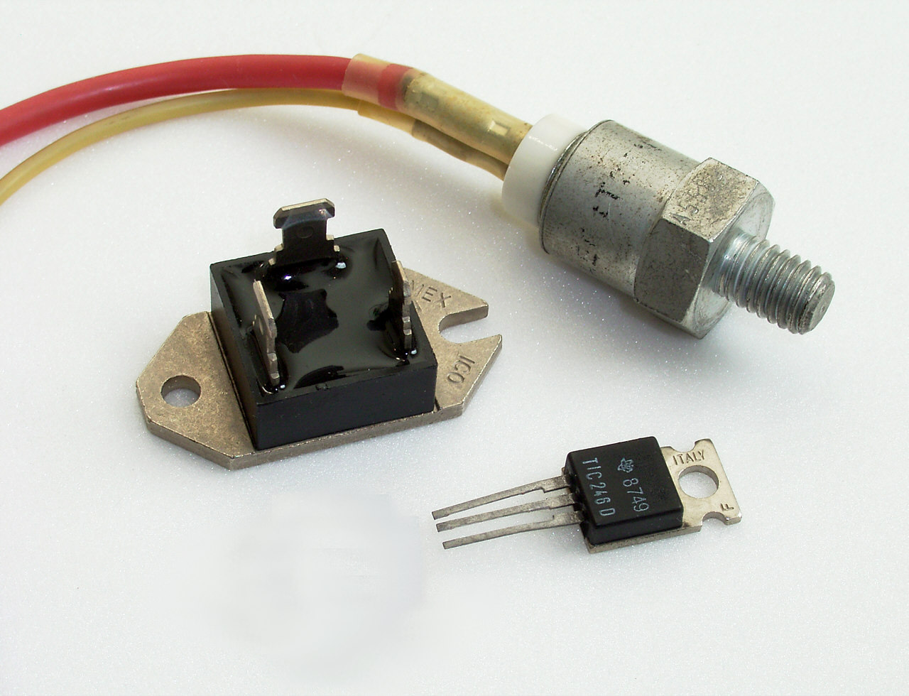 Zwei TRIACs und ein Thyristor in unterschiedlichen Gehäusen